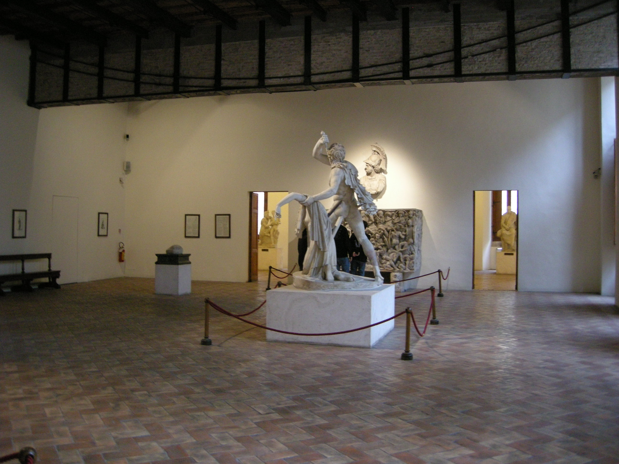 Palazzo altemps, sala